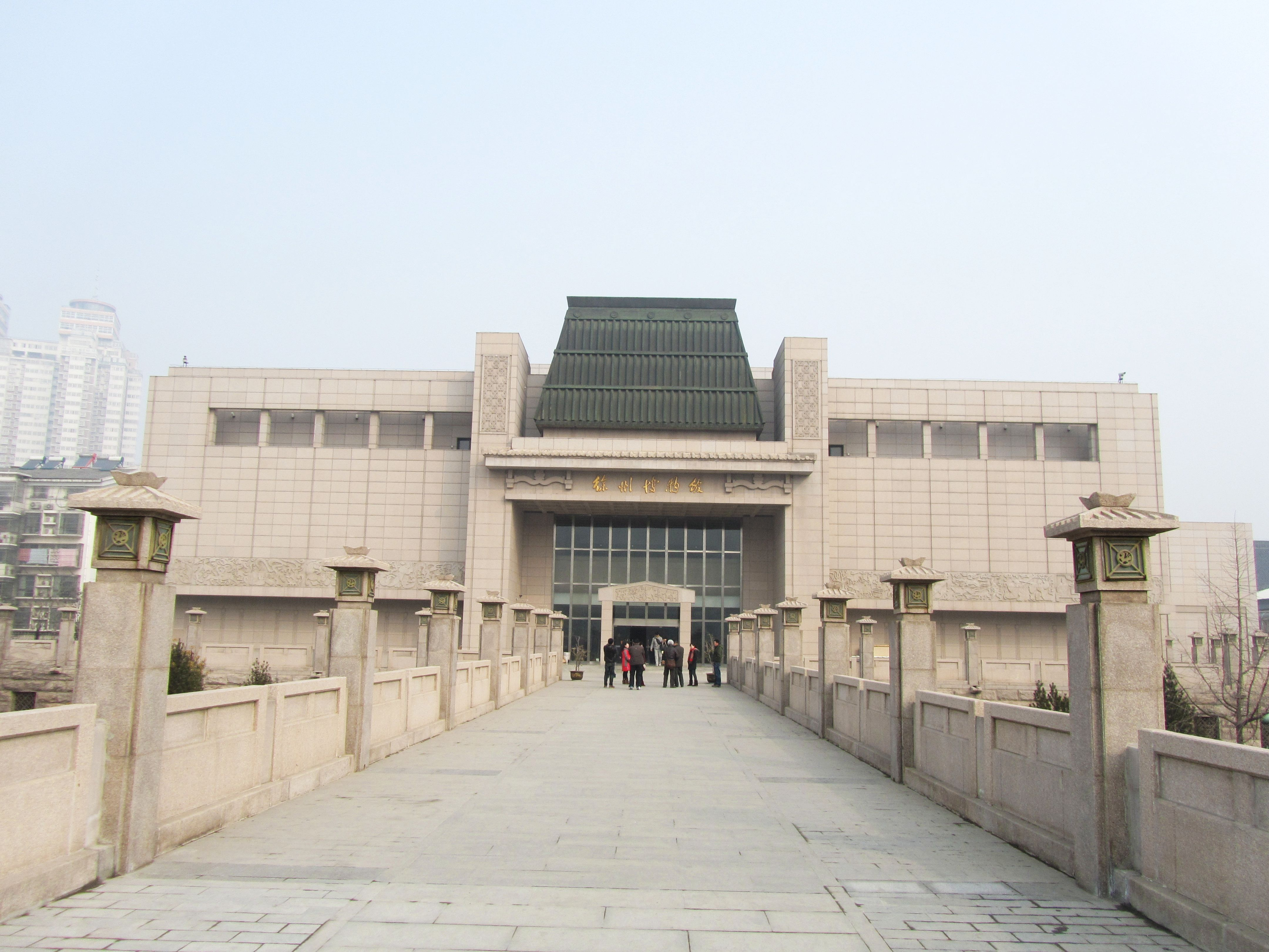 徐州博物馆，主展馆。